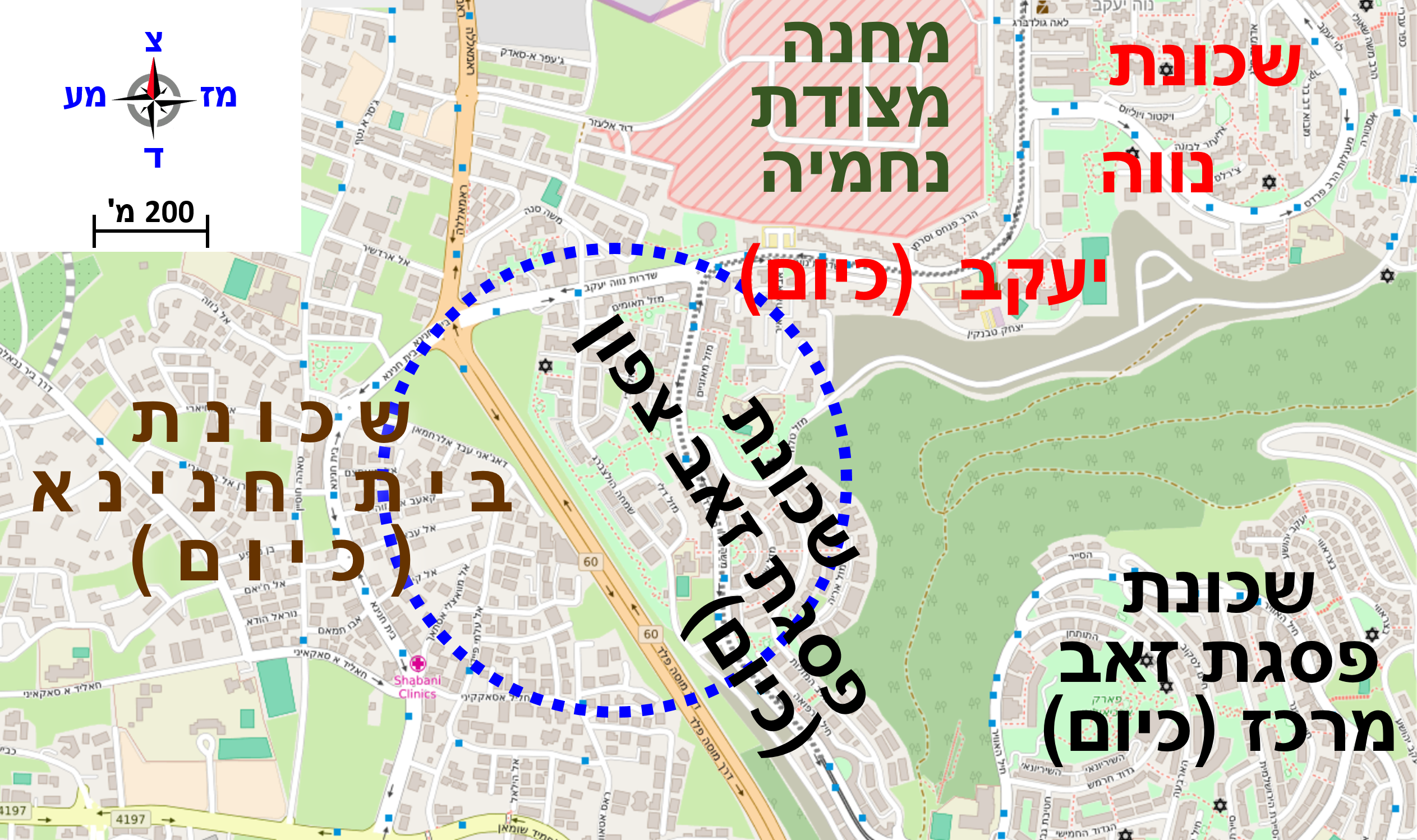 מיקום היישוב נווה יעקב